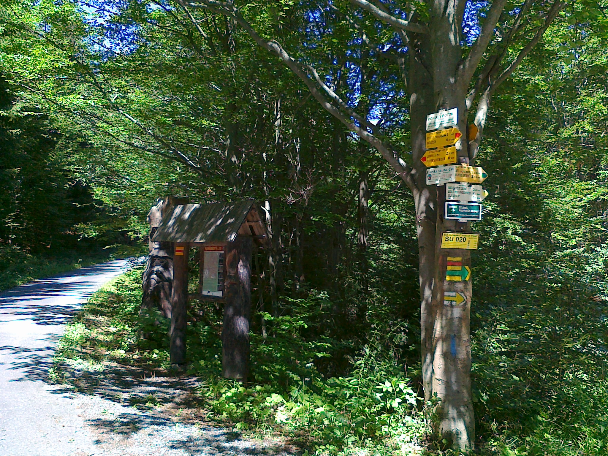 Skrzyżowanie szlaków o nazwie Poniklý potok